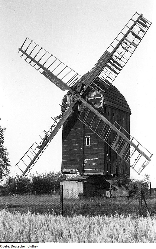 Original image description from the Deutsche FotothekWulferstedt. Bockmühle, Baujahr 1805